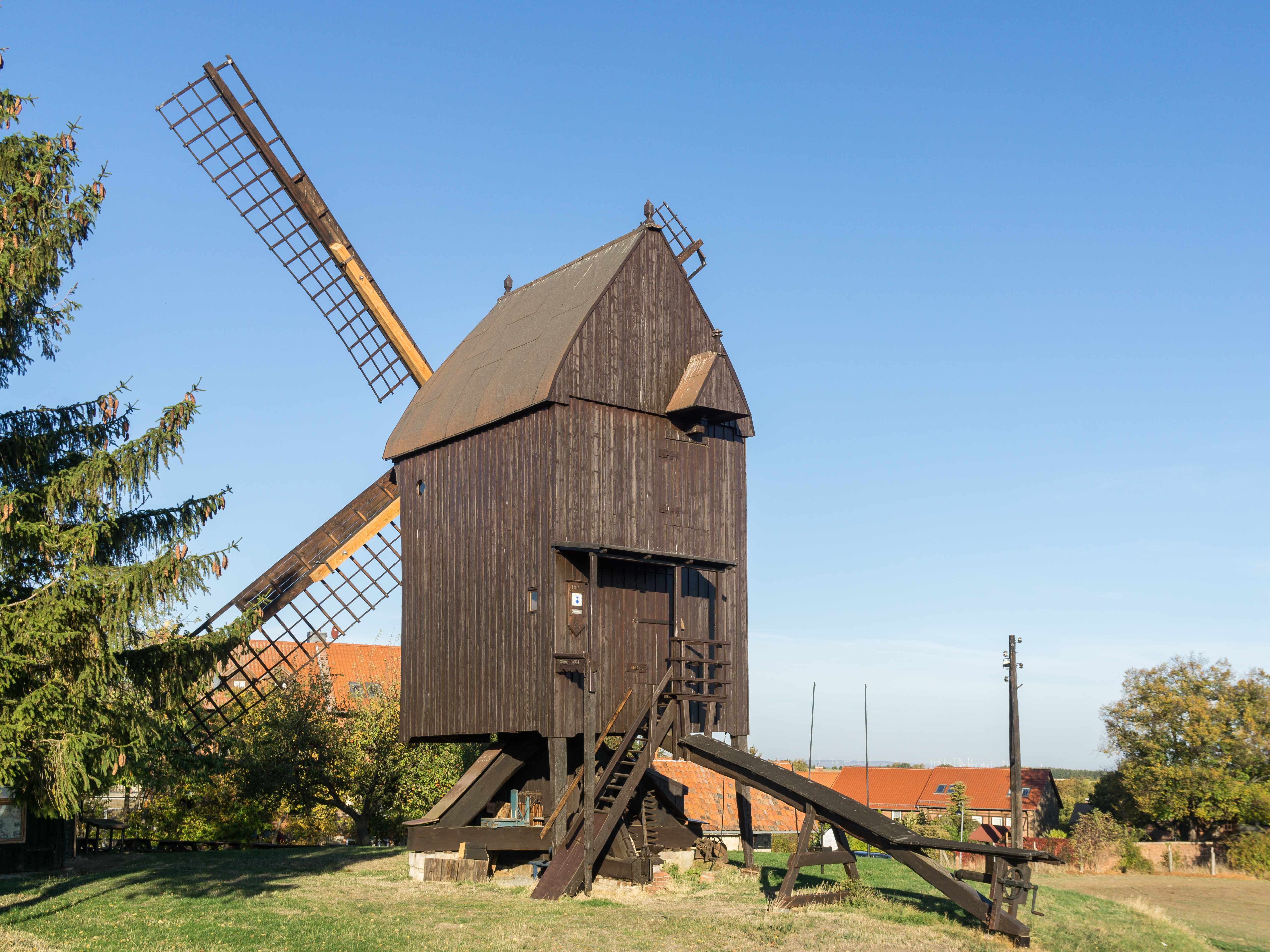 Bockwindmühle am Ortsrand von Huy OT Andersbeck